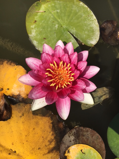 Nymphaea Alba (varieta' rosa) Jardin Botanique Genevois